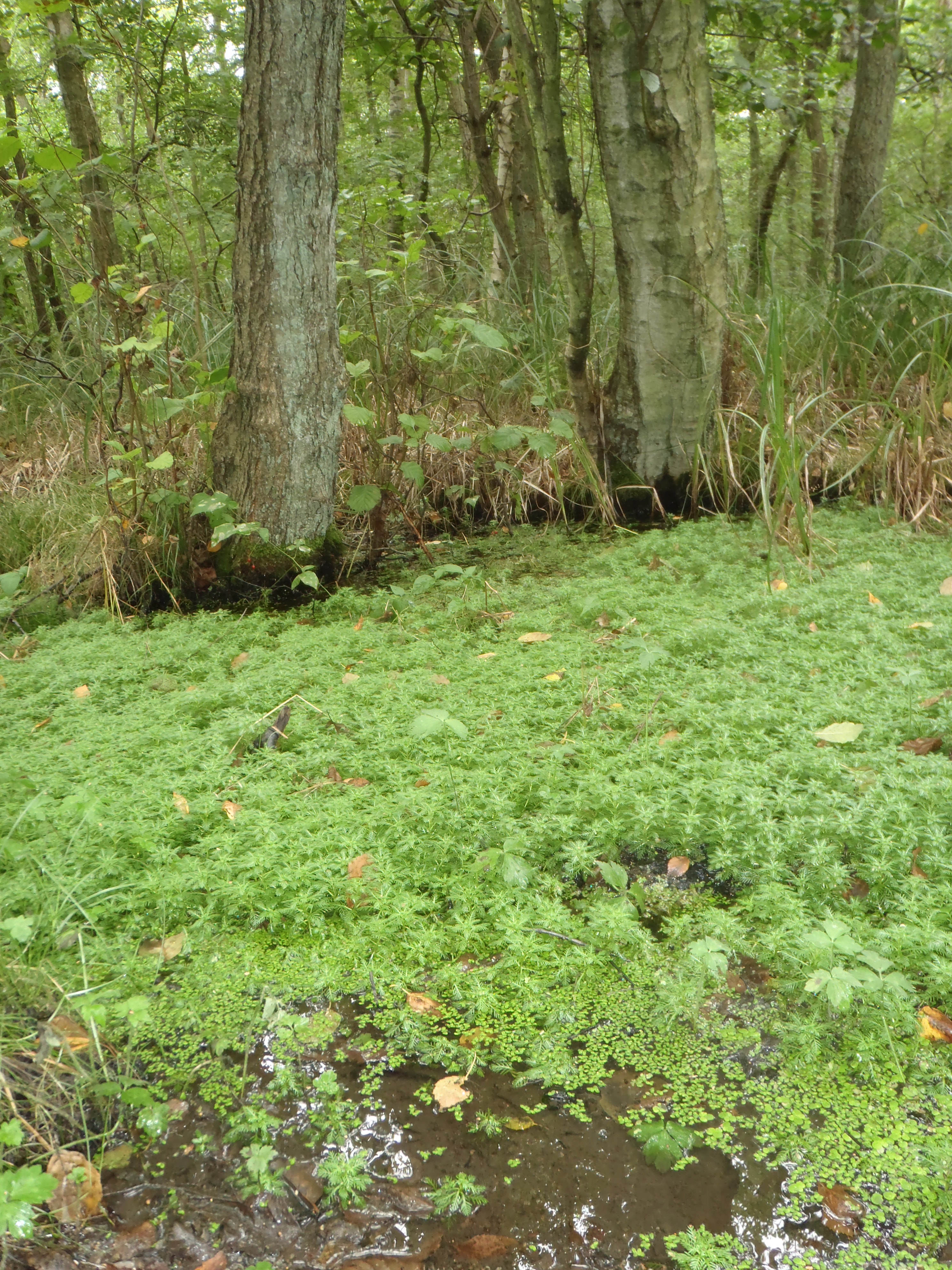 Lyngby Åmose ved Lyngby sø